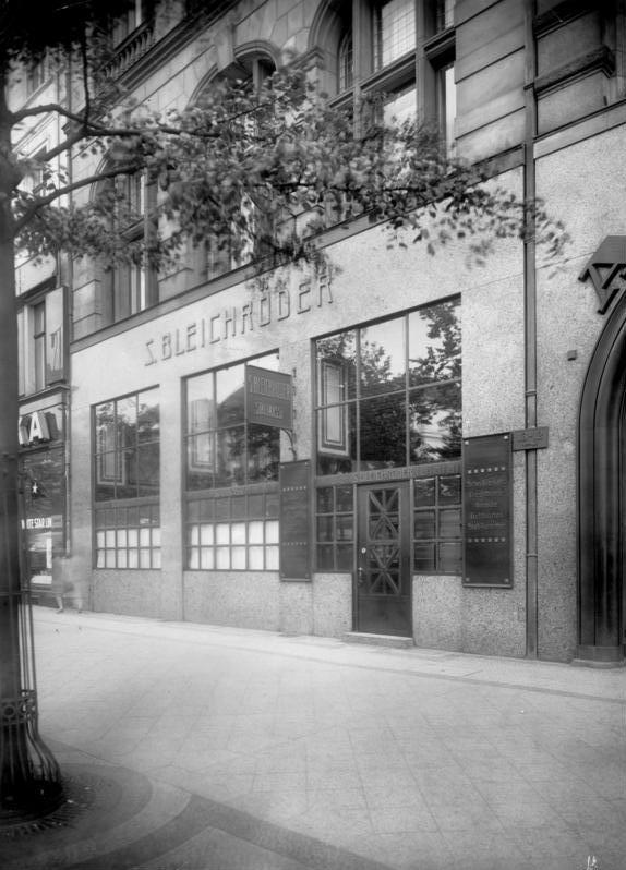 Bleichröderhaus, Unter den Linden